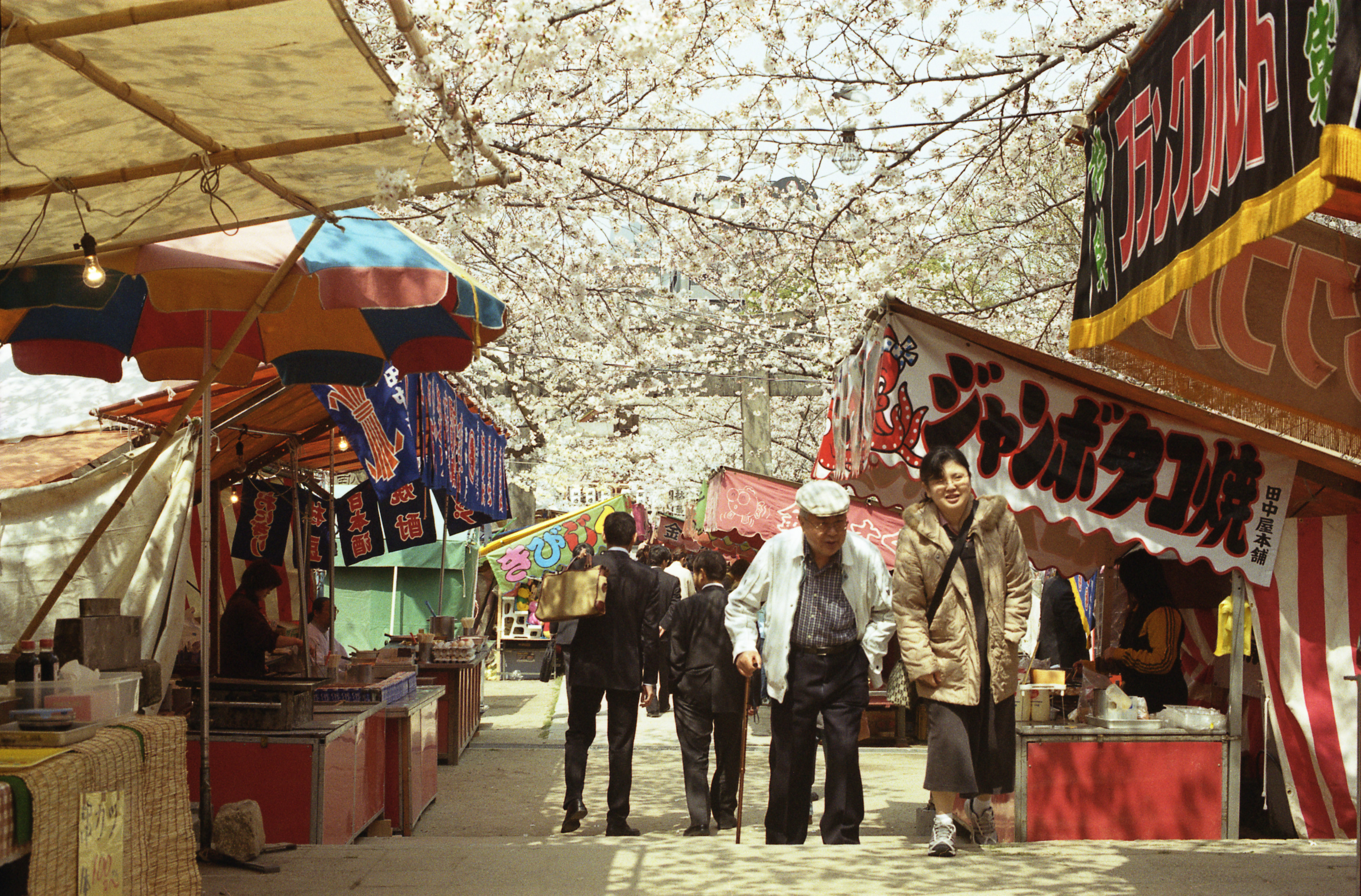 土佐稲荷神社